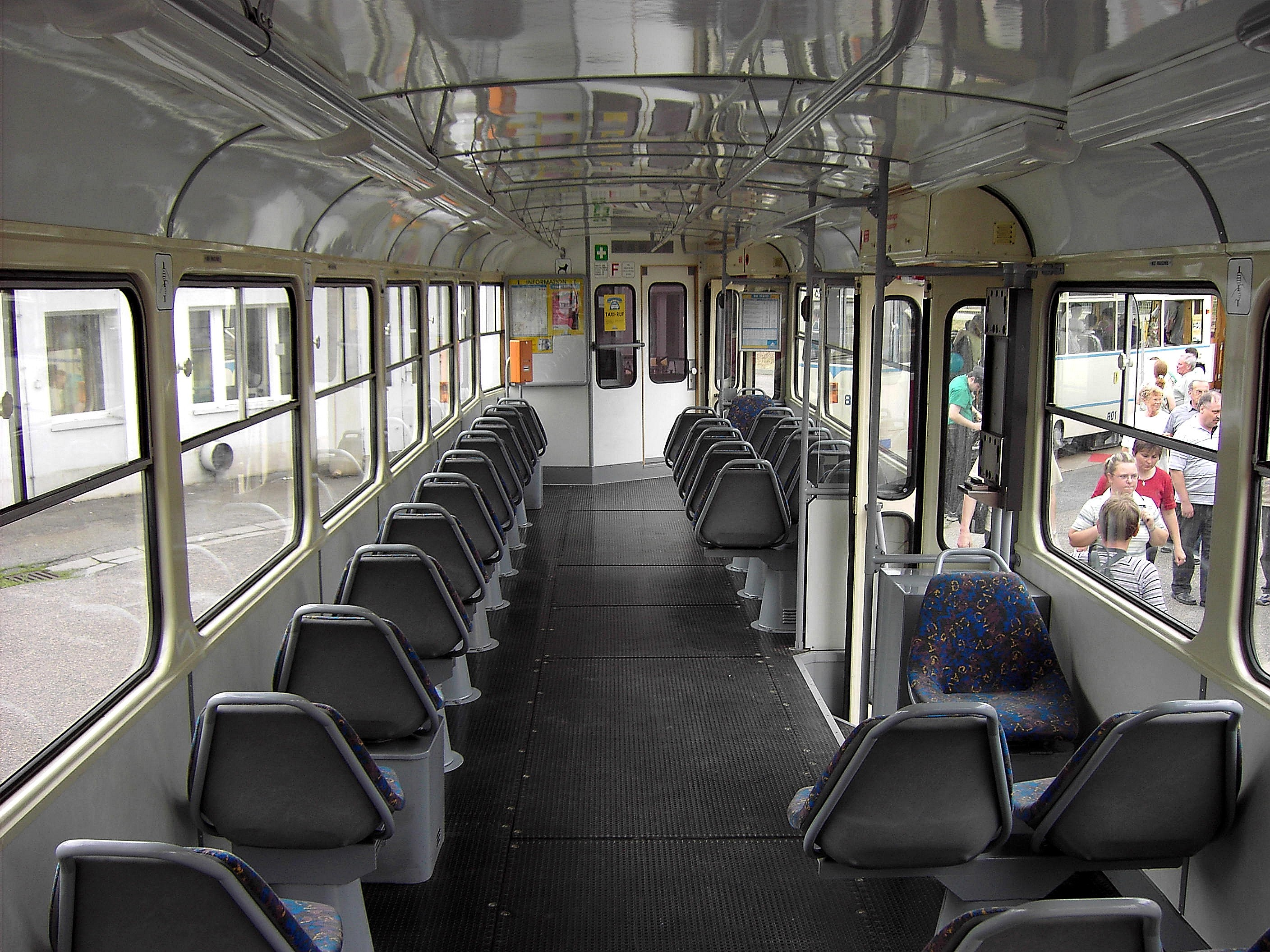 Innenraum eines geringfügig modernisierten T3D (409) in Chemnitz. Die Sitzbezüge stammen bereits von nach der Wiedervereinigung.